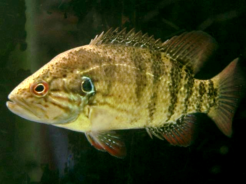 オヤニラミ飼育個体(Coreoperca kawamebari)